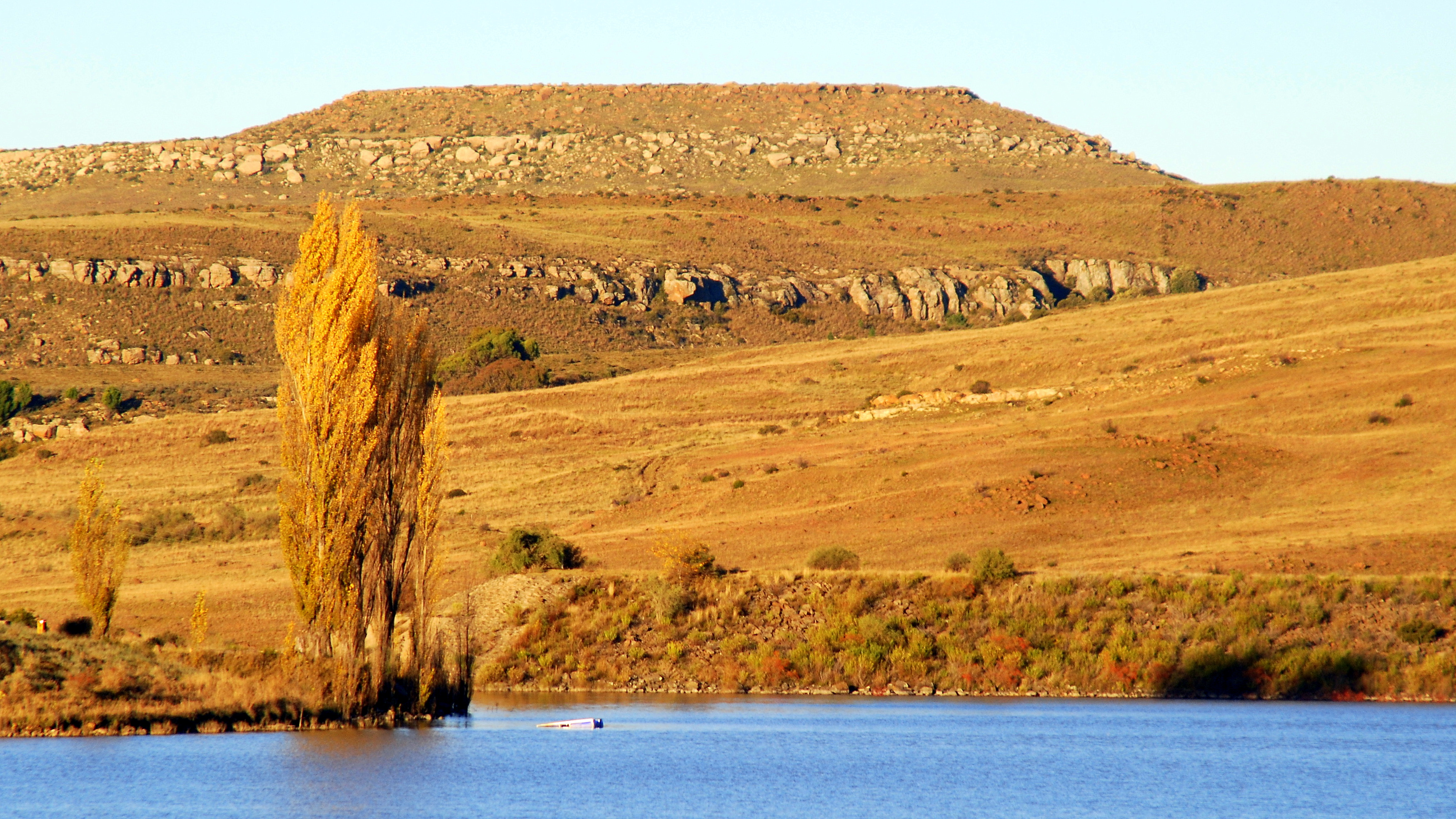 Molteno Dam